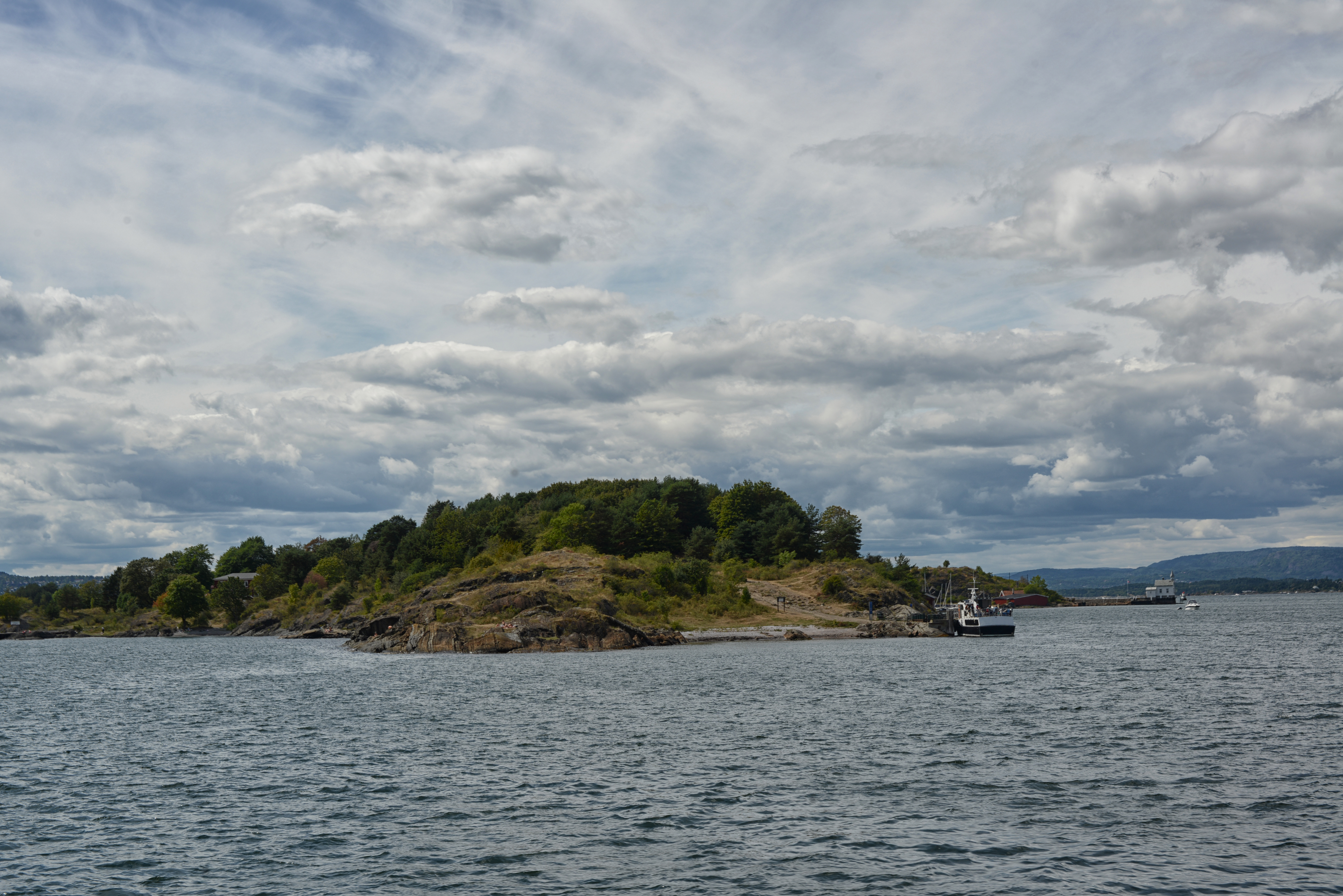 Nordre brygge på Gressholmen